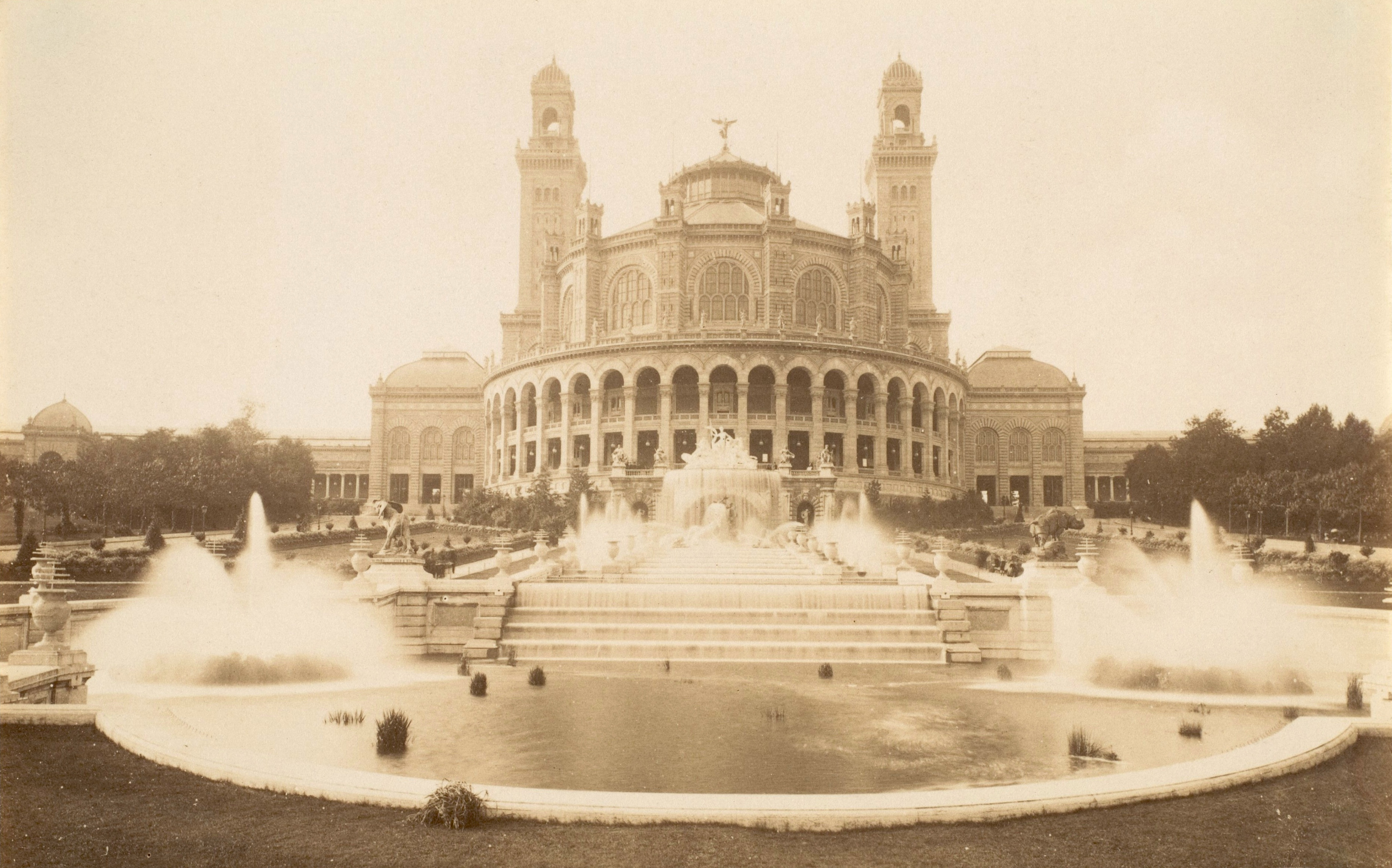 Palais du Trocadero